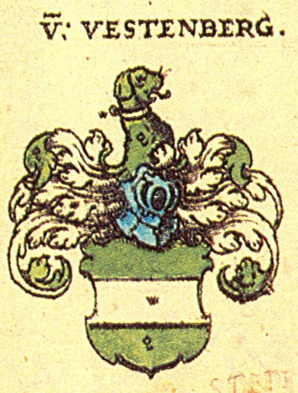 Wappen der Fränkischen Adelsfamilie Vestenberg